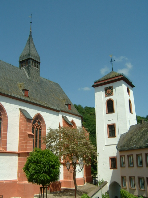 Neuerburg, Eifel - Pfarrkirche und Torturm